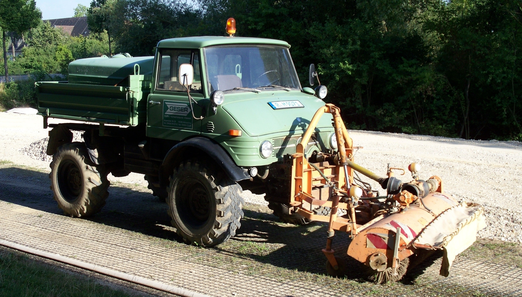 Ein Unimog 406 im Sommer 2009.